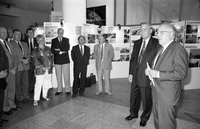 Bonn, 17.7.1991 Für die Bundesvereinigung der Straßenbau- und Verkehrsingenieure e.V. (BSVI) eröffnete deren Präsident, Diplomingenieur, Manfred Werz, in Anwesenheit des Staatssekretärs im Bundesverkehrsministerium, Dr. Wilhelm Knittel, im Bundesverkehrsministerium die Ausstellungen "Wege zu Mehr Verkehrssicherheit" und "Ingenieurbauwerke im Straßenbau".